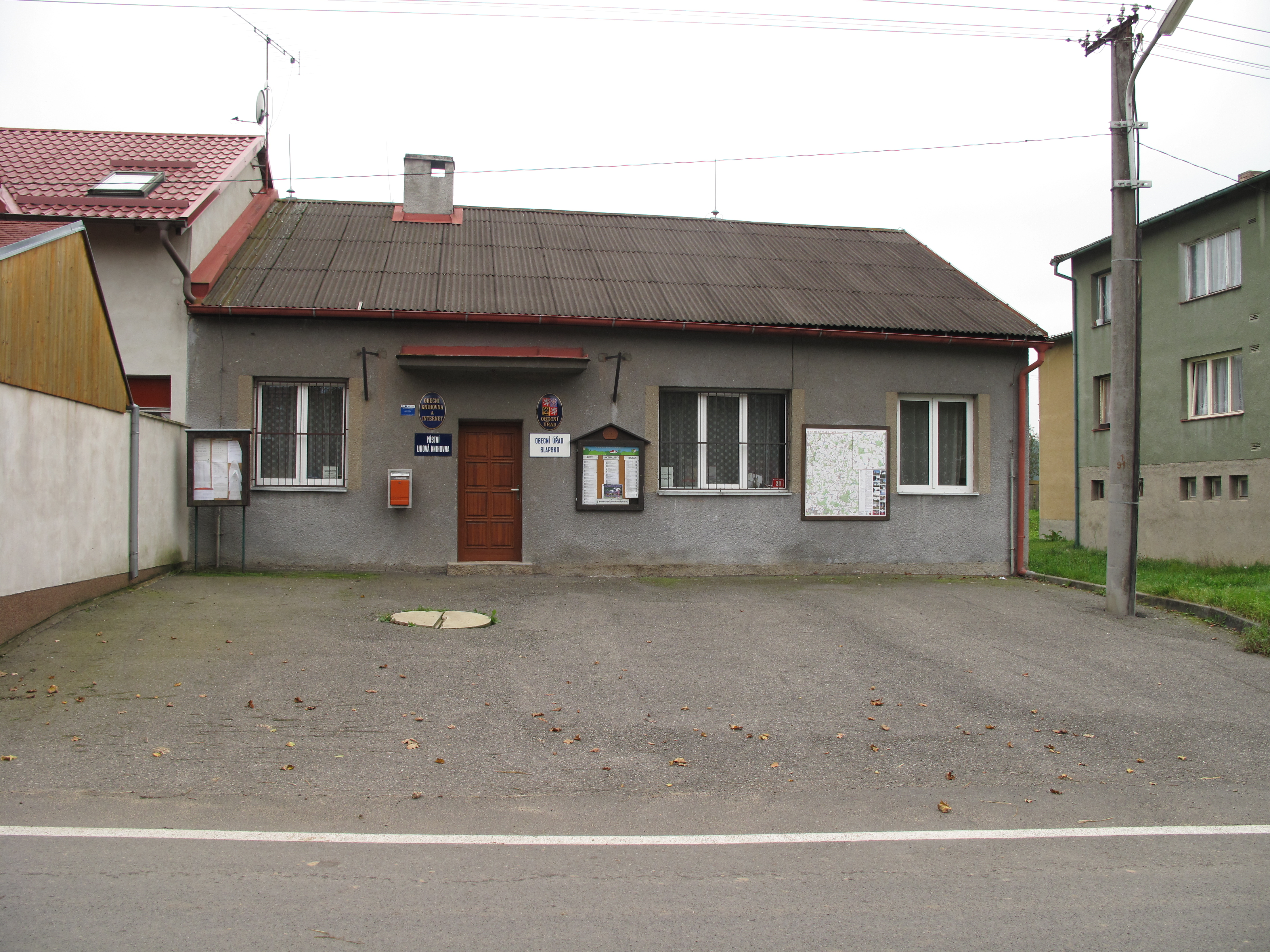 Obecní úřad ve Slapsku. Okres Tábor, Česká republika.